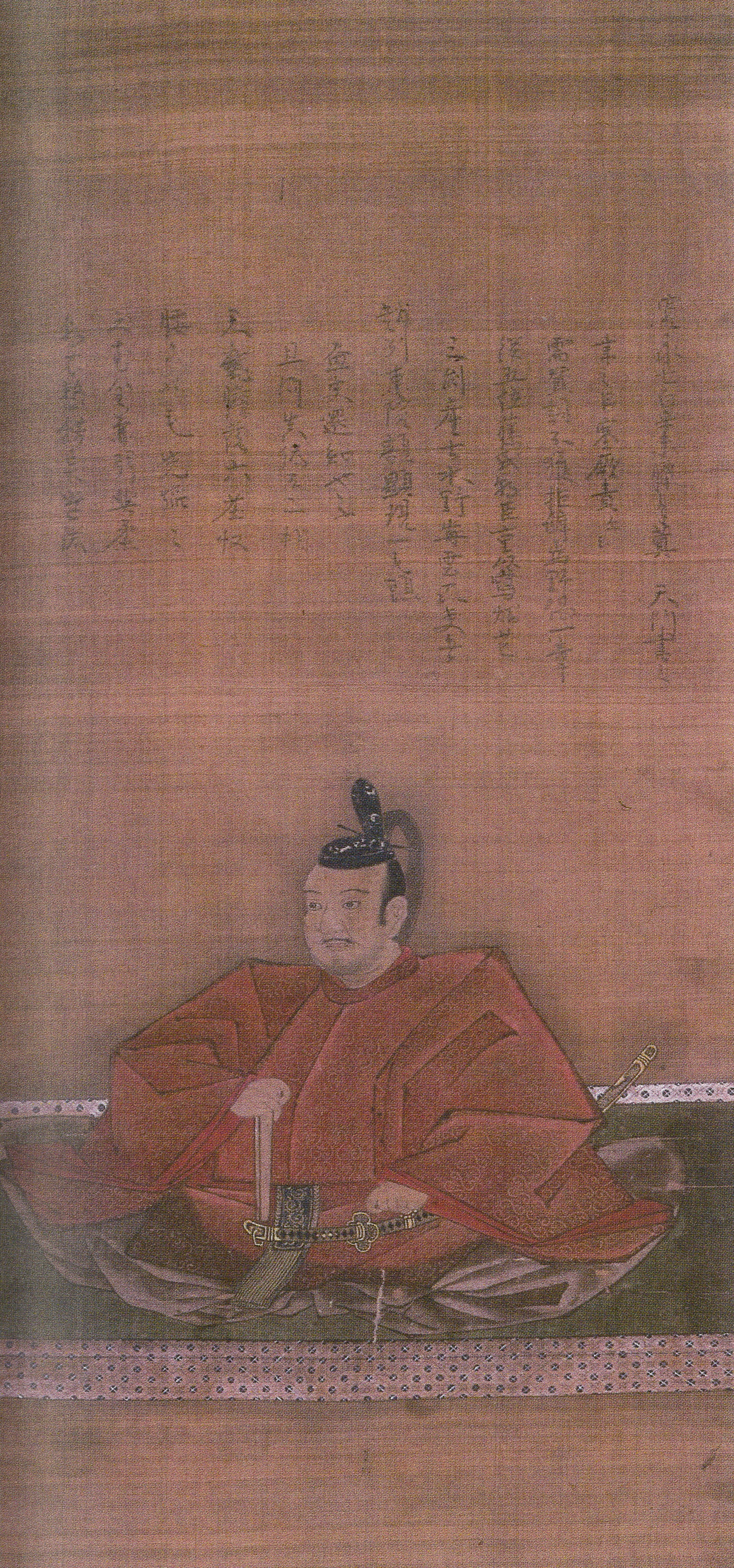 紀伊新宮藩初代藩主・水野重央の肖像画。